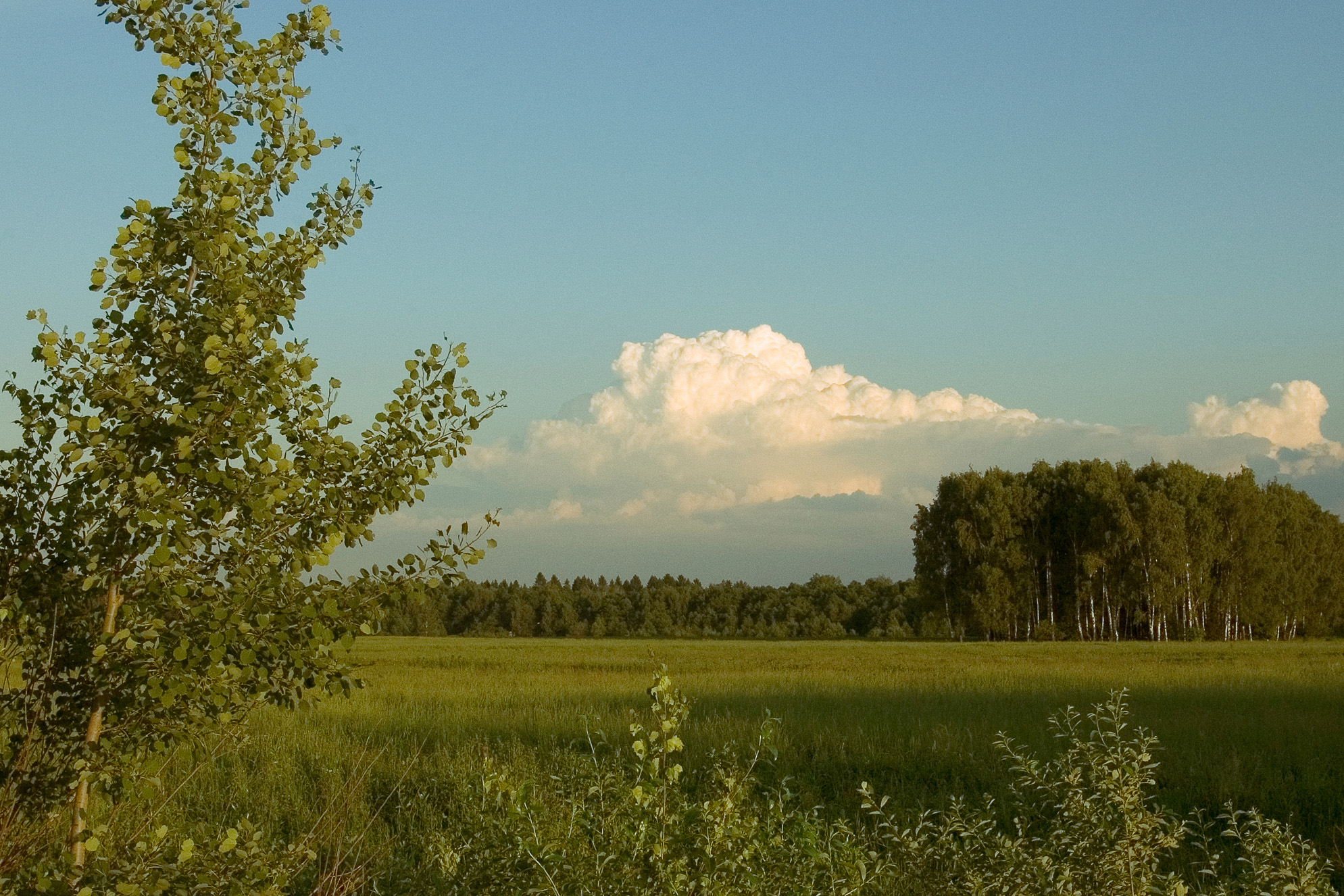 Жители деревни Шевелкино узнают на этом снимке кладбище. Оно справа, в рощице